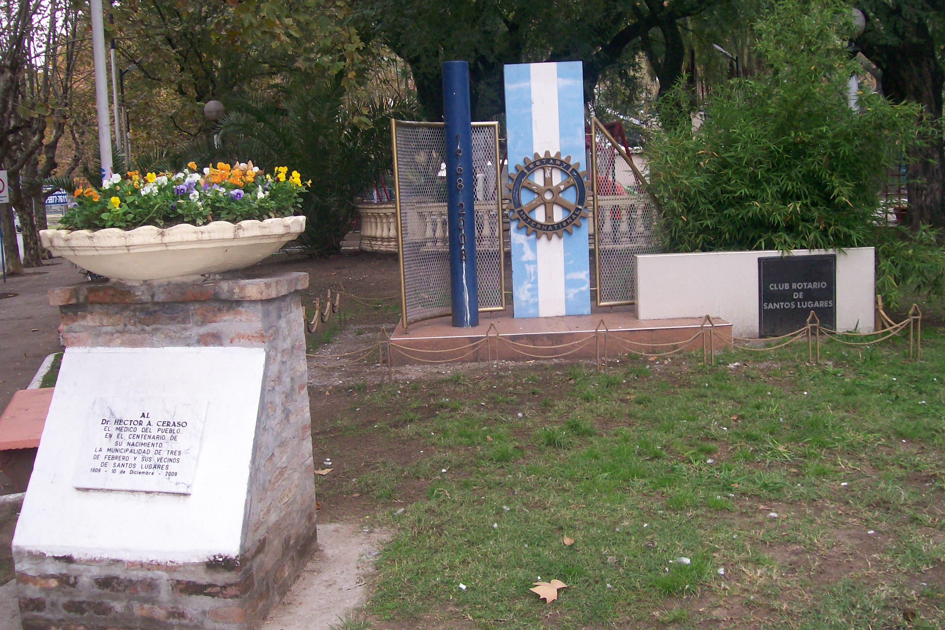 Plaza Arturo Illia de Santos Lugares monumento Dr. Ceraso y Club Rotario